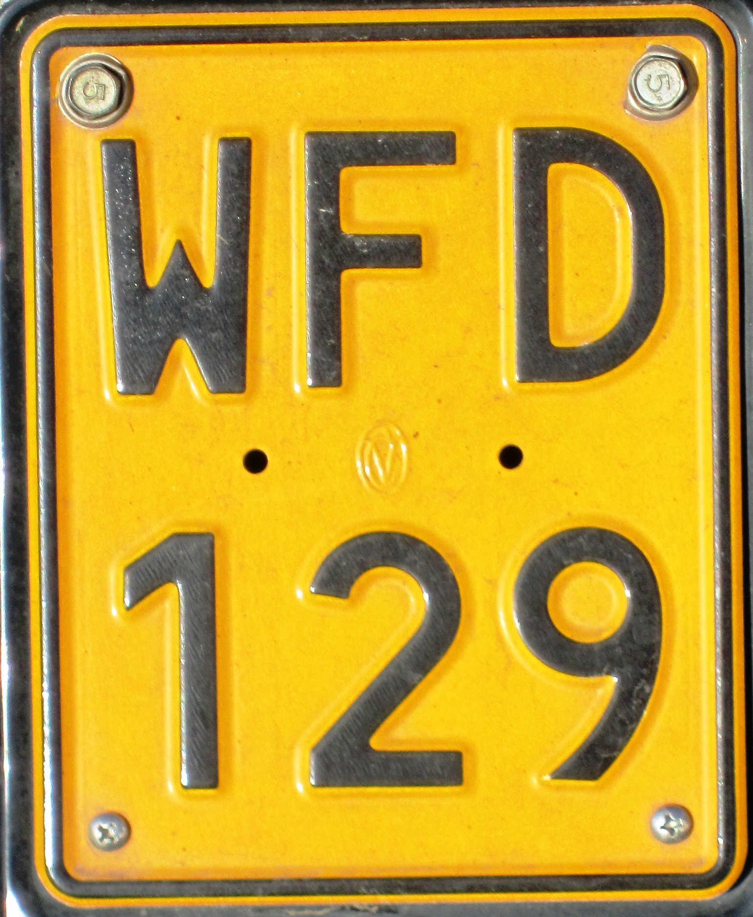 België motor kenteken